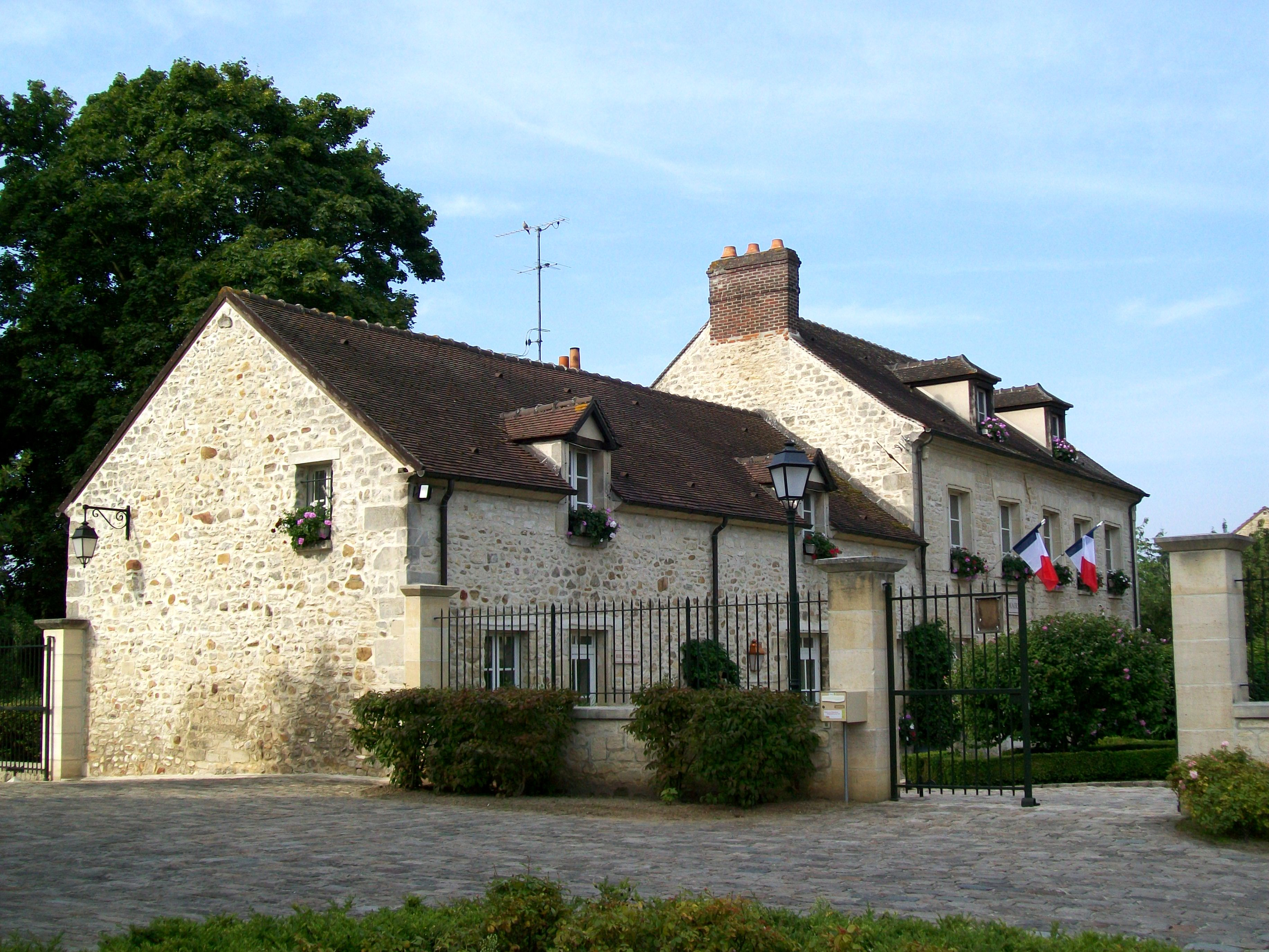 Autre vue de la mairie d'Apremont, entouré par un jardin public.